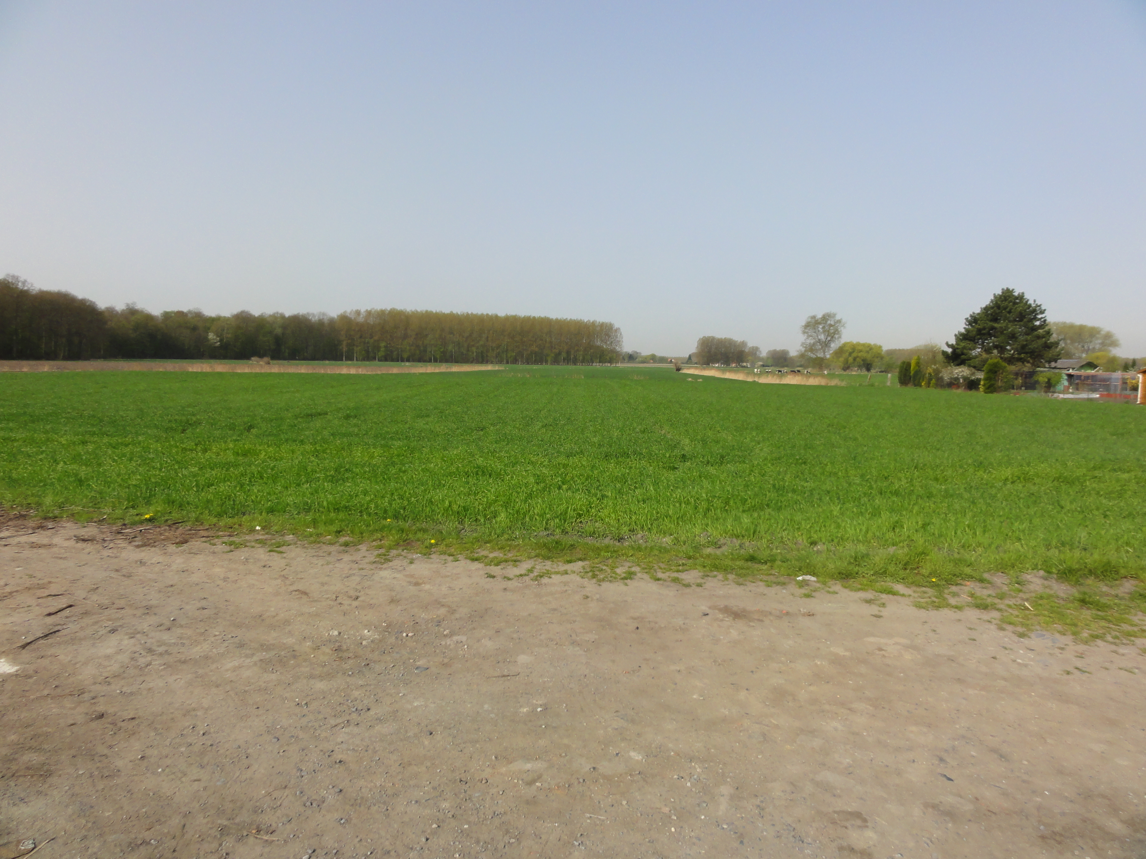 L'Avaleresse des Tertres de la Compagnie d'Hasnon était un puits sans exploitation situé à Hasnon, Nord, Nord-Pas-de-Calais, France.